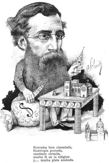 Juan D. Jackson